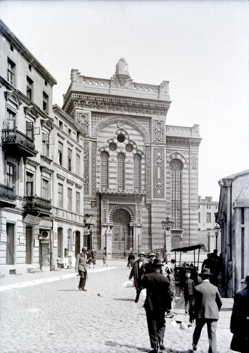 Synagoga Alte Szil w Łodzi